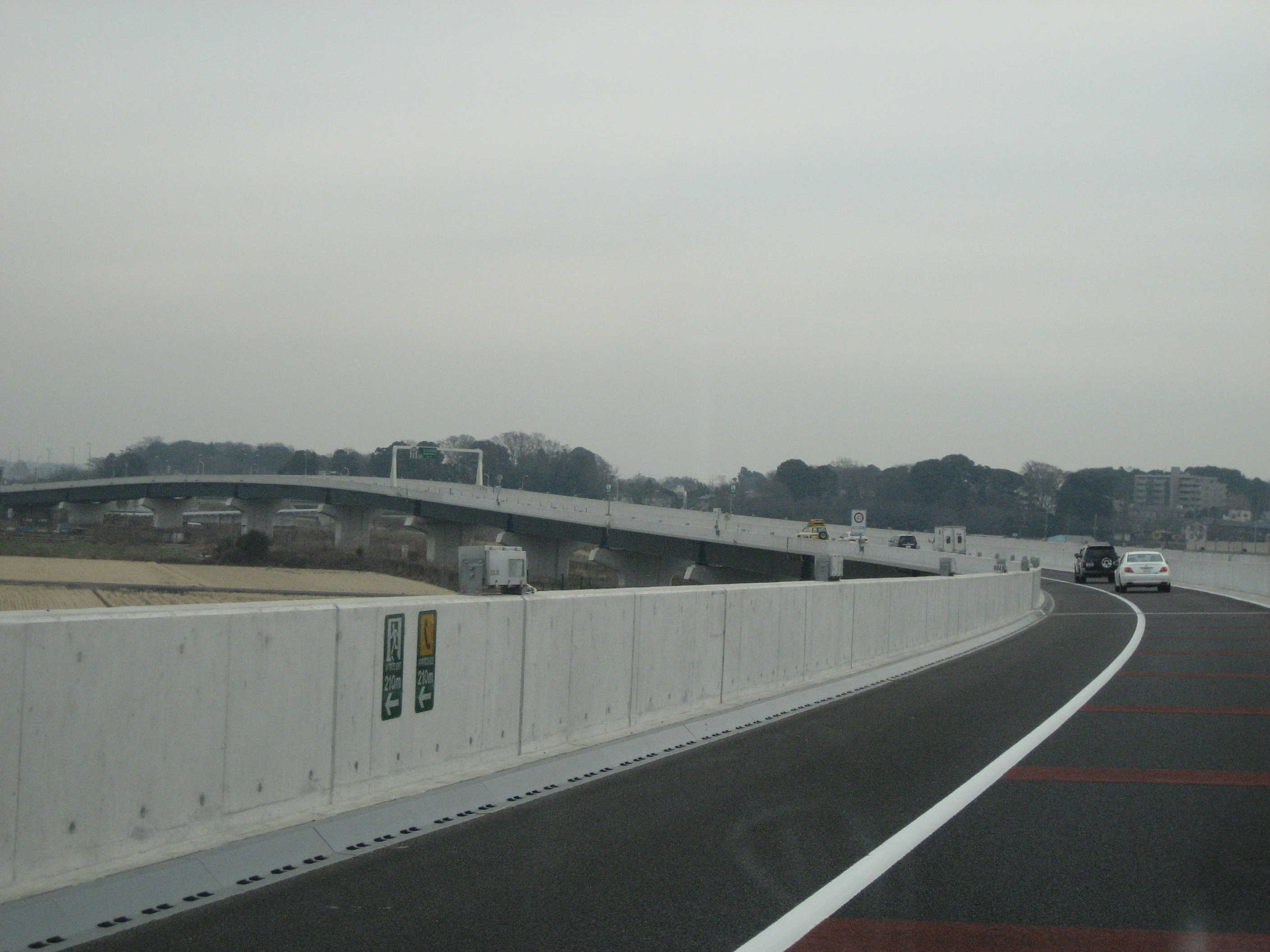 さいたま新都心線